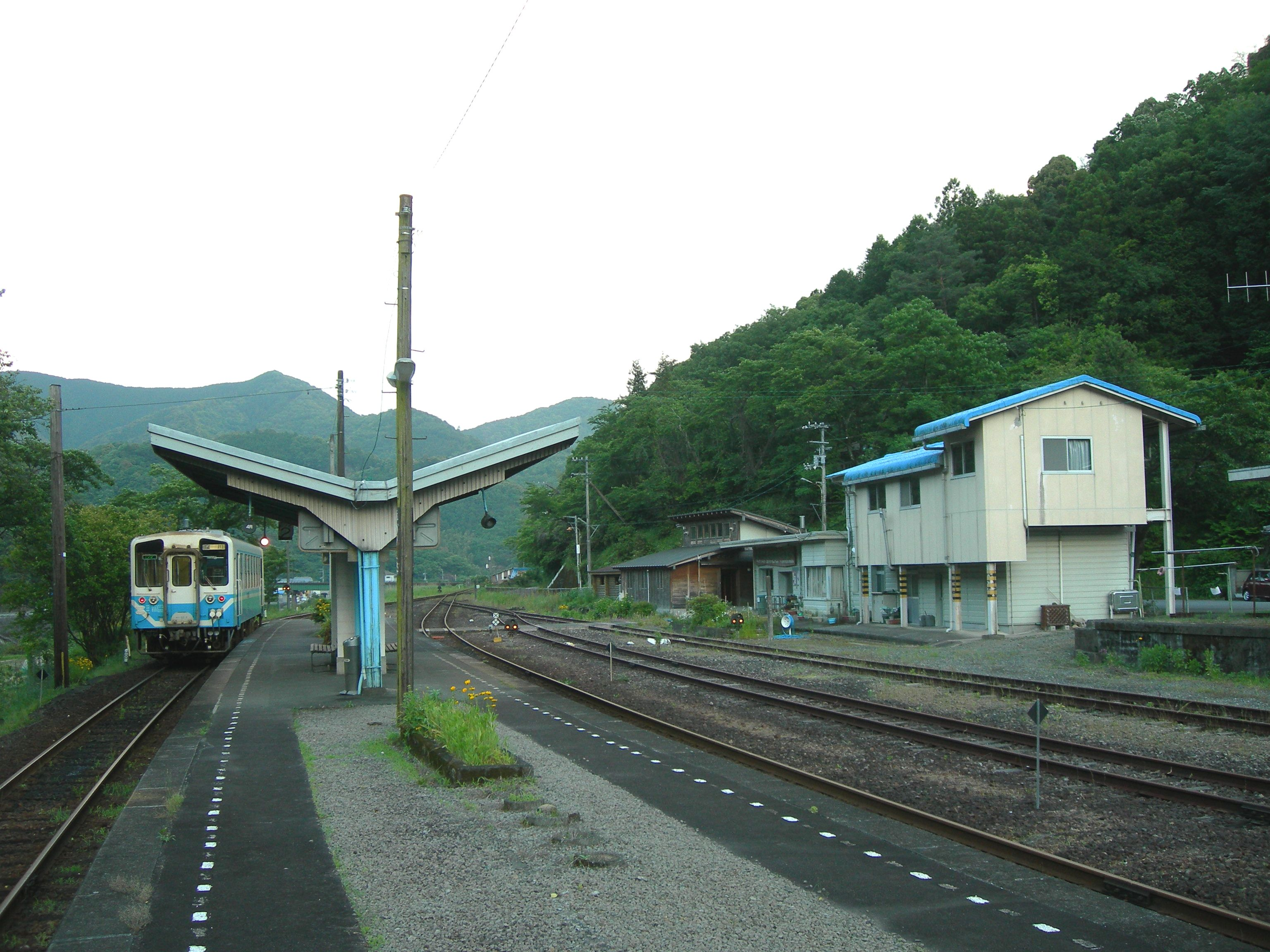 江川崎駅ホーム